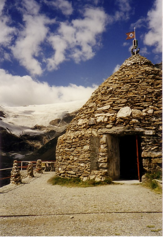 Crotto aus dem Jahr 1876, am "Sassalmason" in 2355m Höhe.